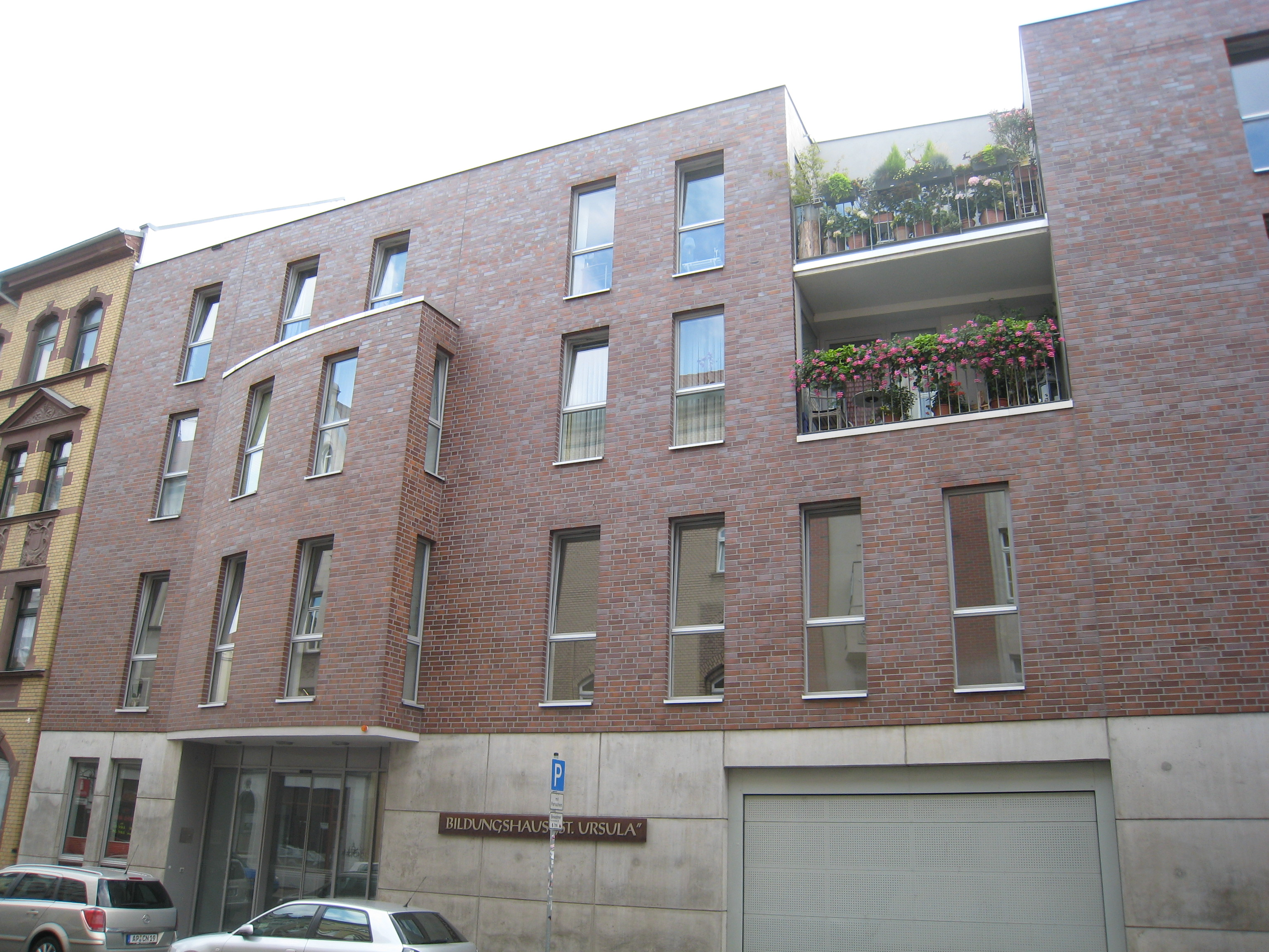 Bildungshaus St. Ursula in Erfurt, Trommsdorffstraße 29